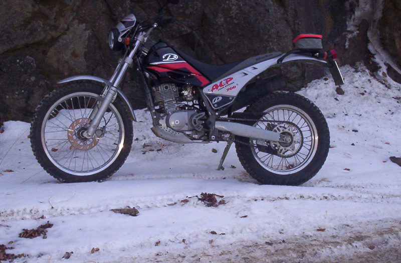 Autore: Gianni Martilli Fonte: Gianni Martilli Descrizione: Beta Alp 200 fotografata durante un'escursione in montagna Licenza d'uso: Libero dominio